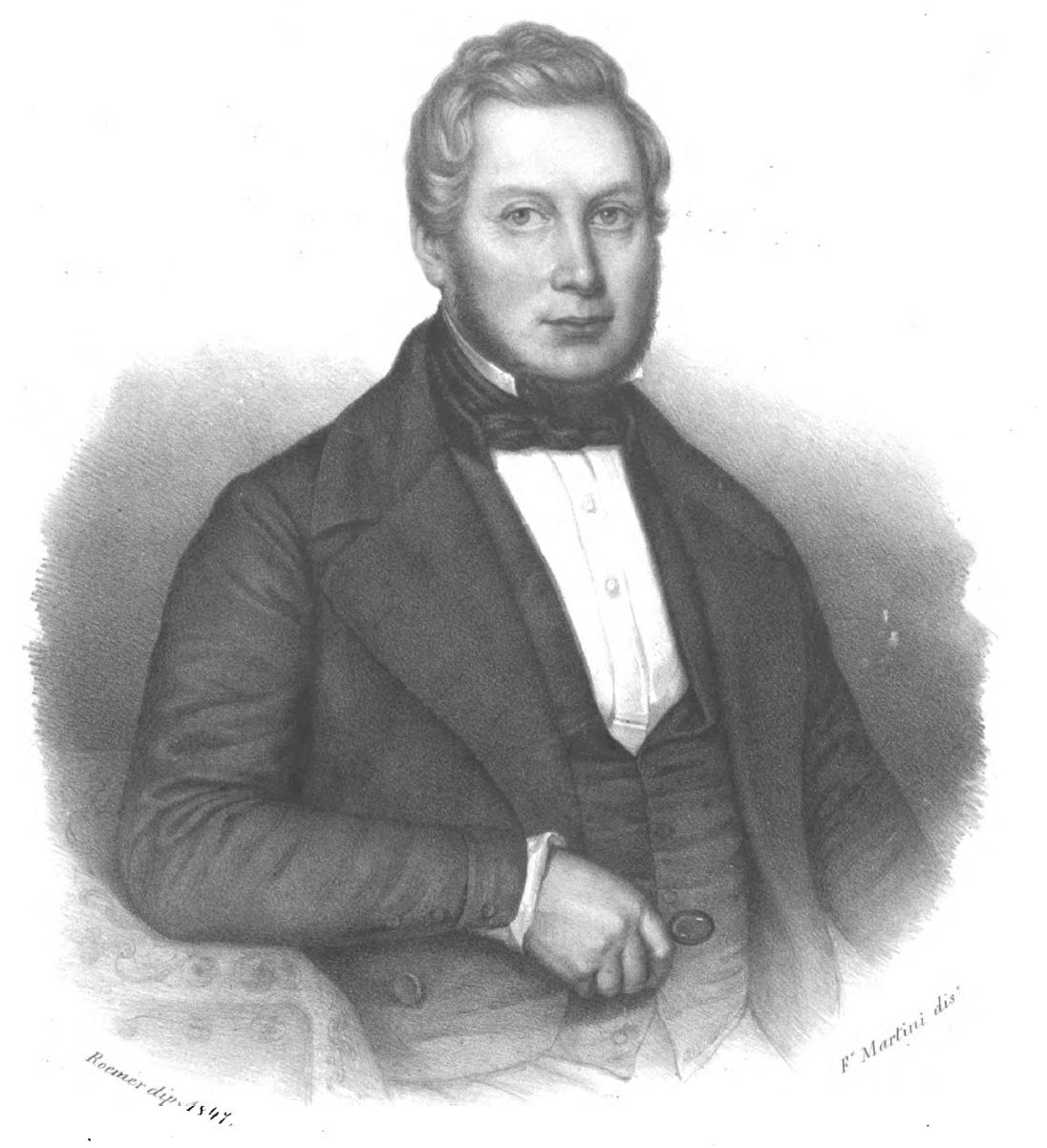 Porträt von Philip Barker Webb (1793-1854), F. Martini 1847